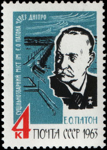 Почтовая марка СССР - Патон Евгений Оскарович, Герой Социалистического Труда